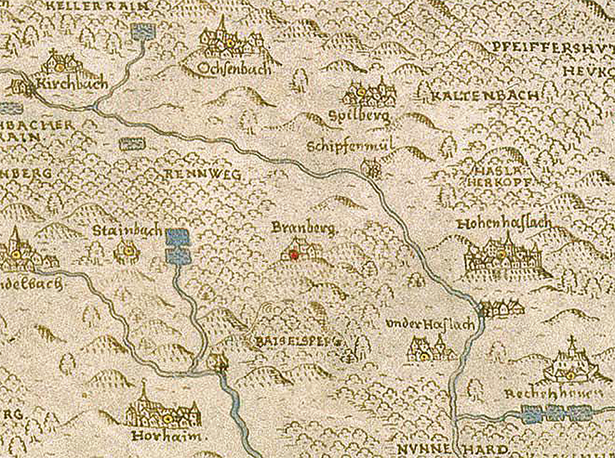 Burg Bromberg an der Nordabdachung des Baiselsbergs über dem Kirbachtal. Ausschnitt aus der Gadnerschen Karte vom Stromberger Forst